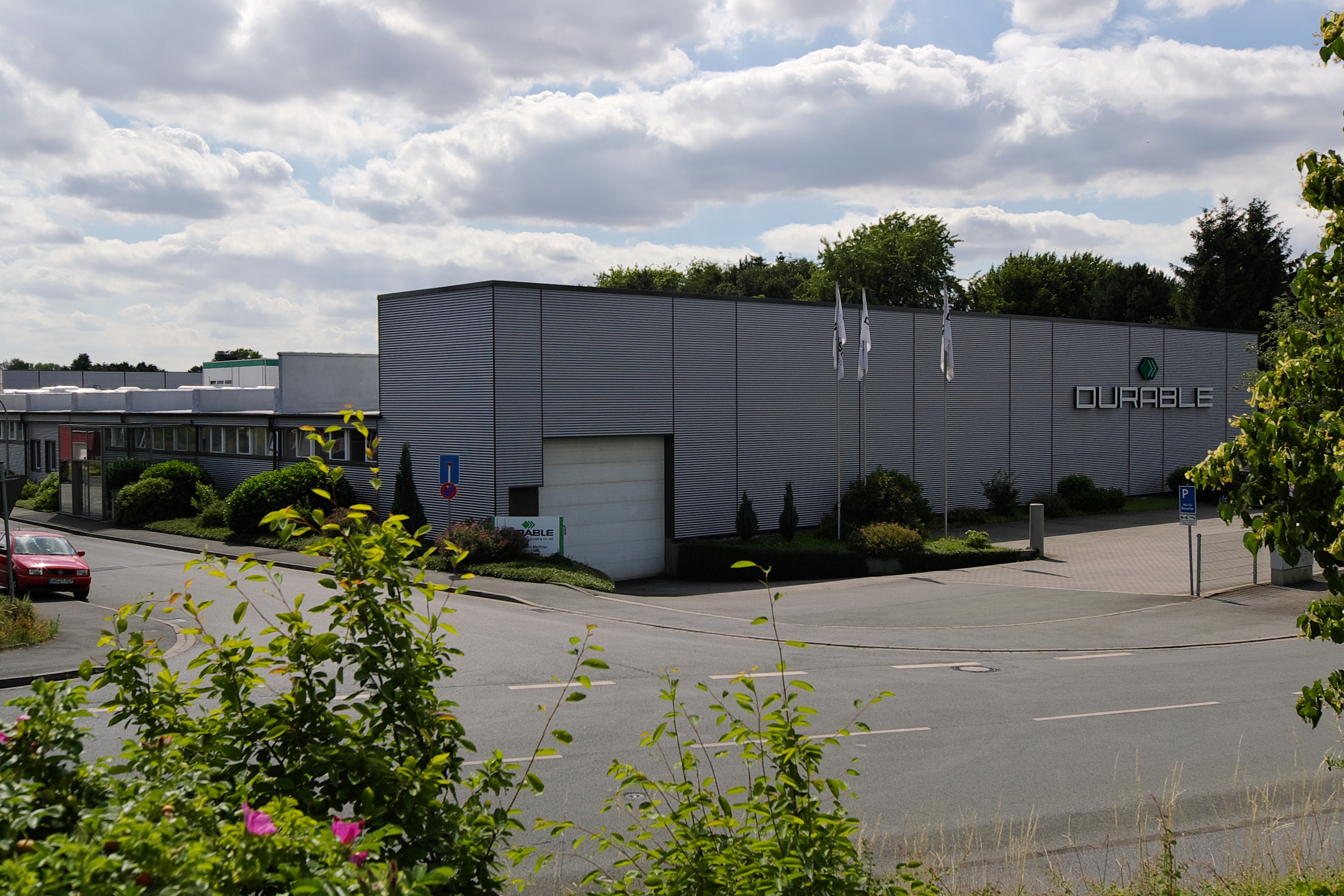 Durable in Kamen-Methler, Ortsteil Kaiserau